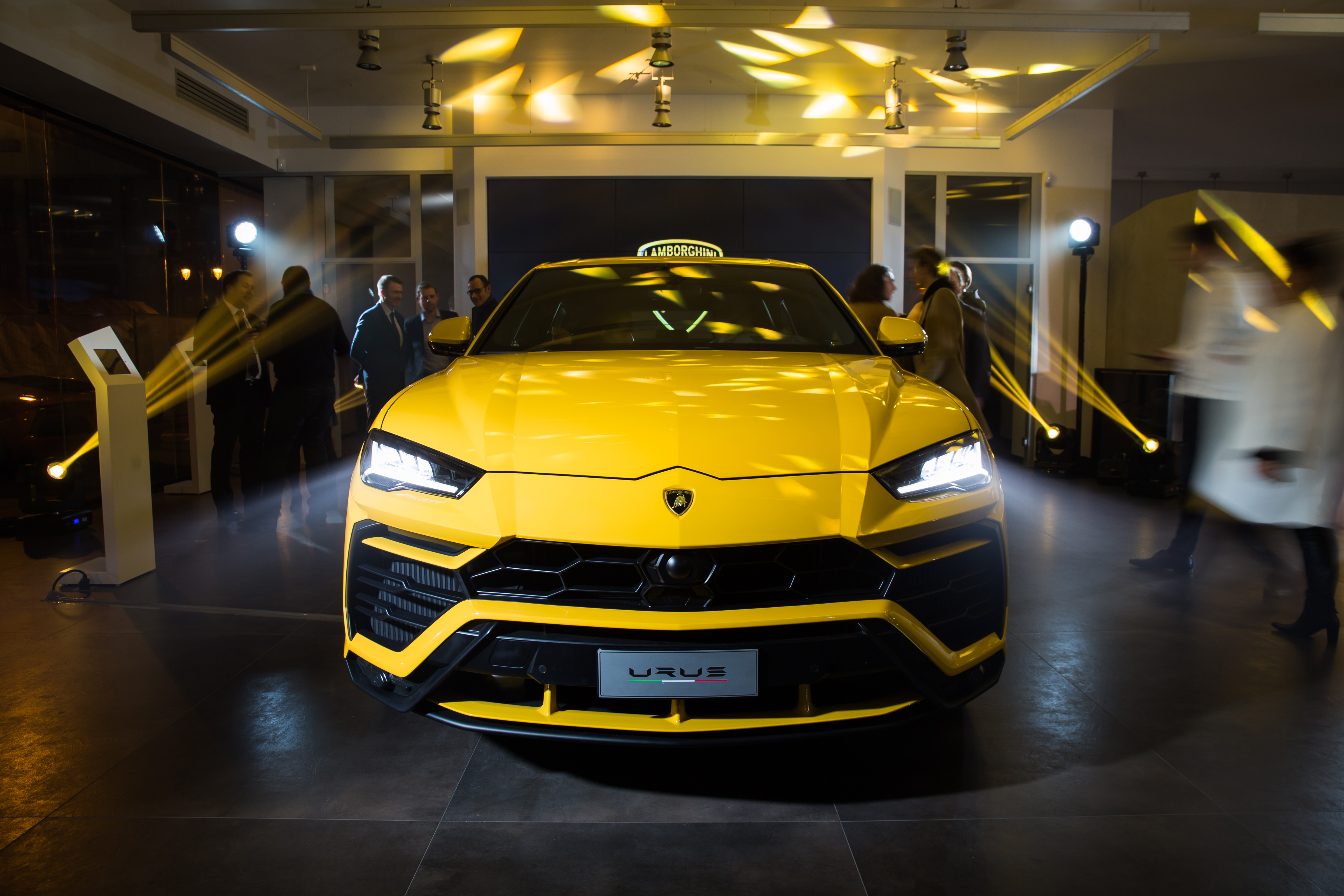 Soirée de présentation de l'URSS Lamborghini